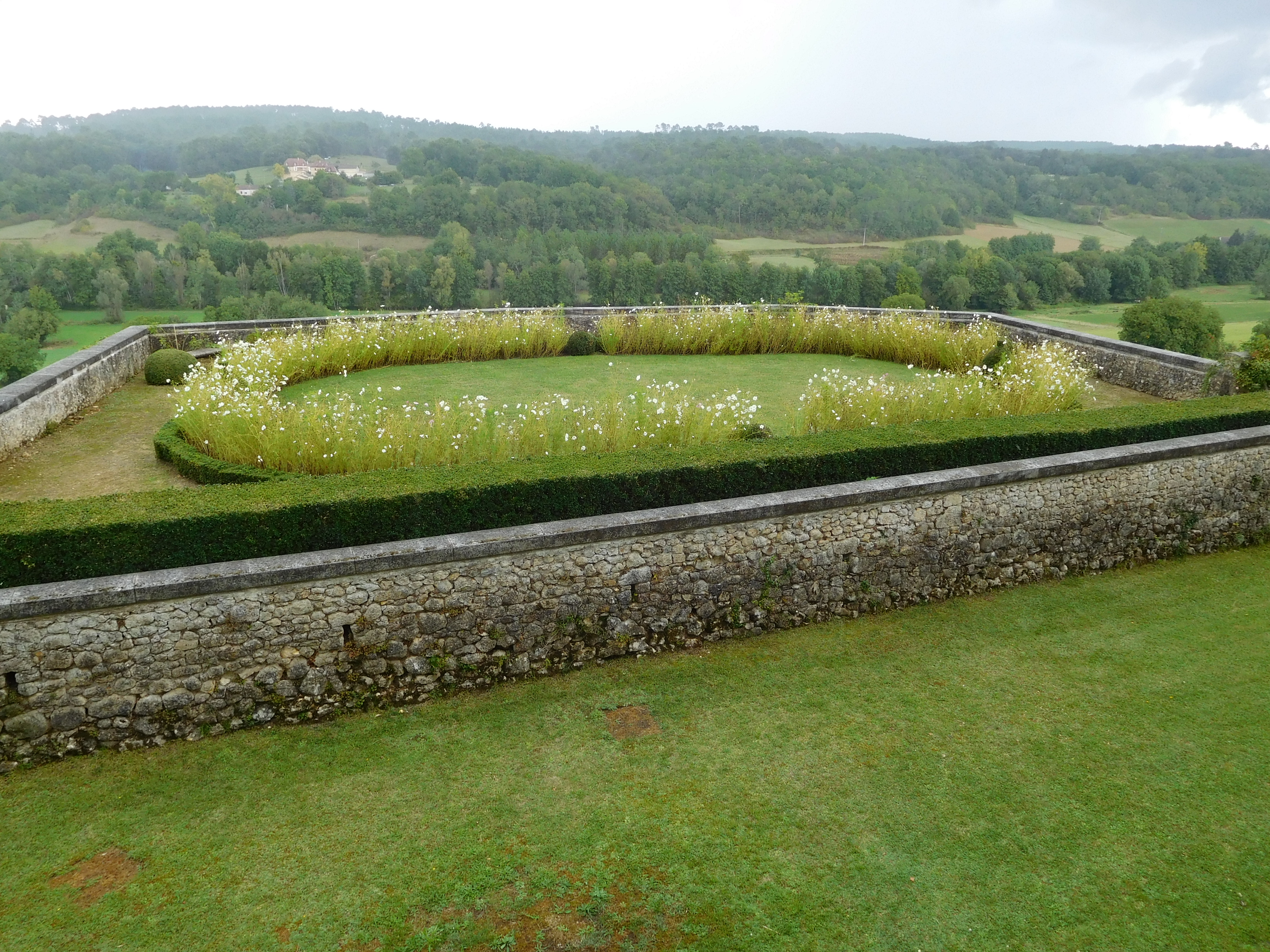 Jardin (avec des cosmos) au pied de la façade et vallée de la Crempse. Château de Montréal, Issac (Dordogne, France).